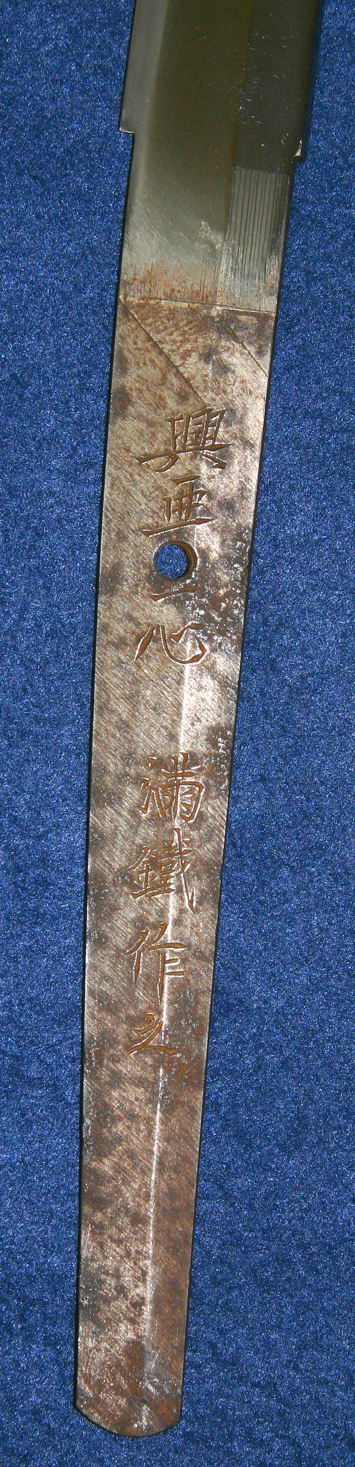 満州鉄道レール説が一時流れたが全くの誤り